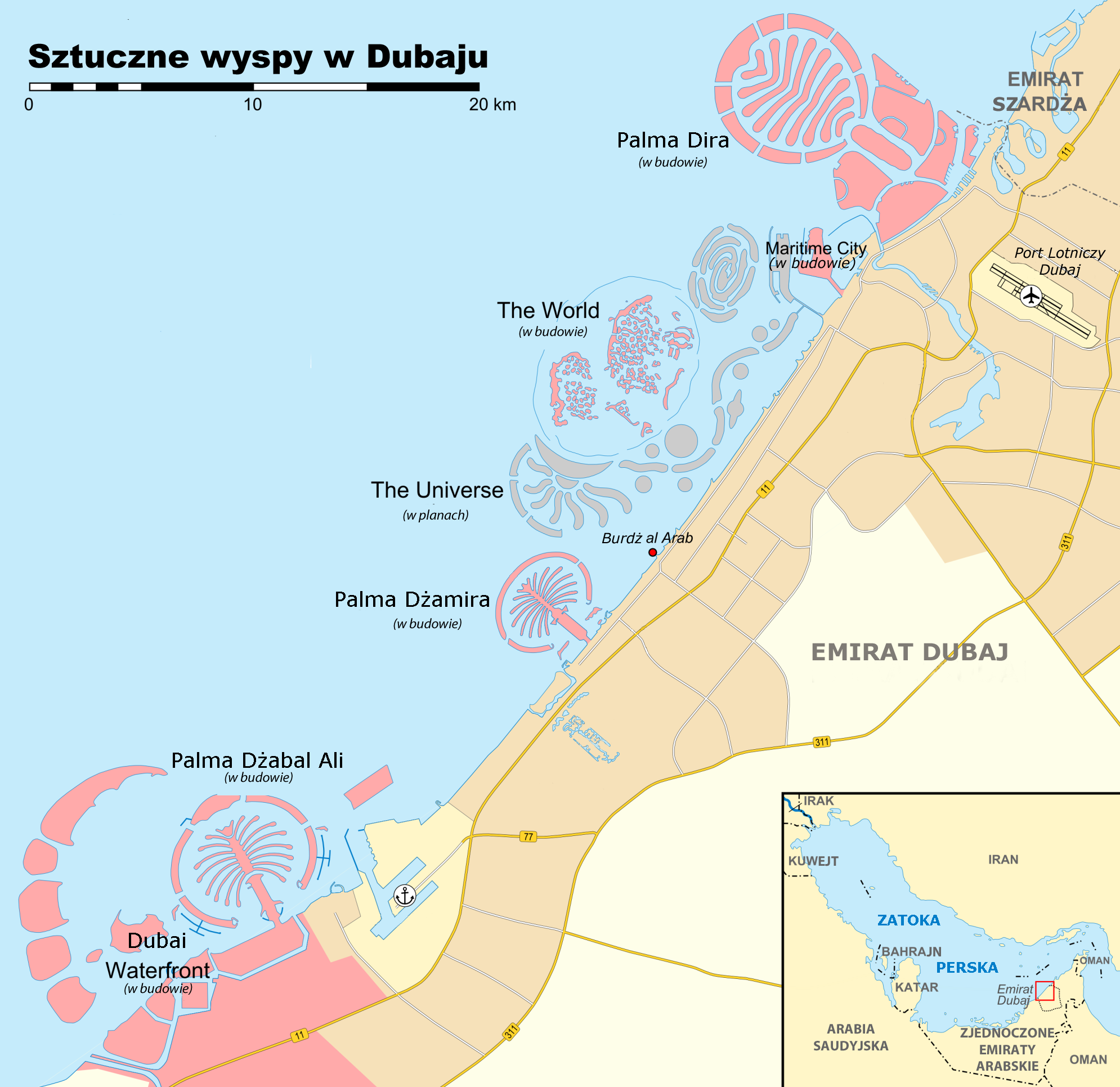 Karte der Bauprojekte in Dubai (Palm Jebel Ali, Palm Jumeirah, Palm Deira, The World, The Universe, Waterfront u.a.), Stand: 2009